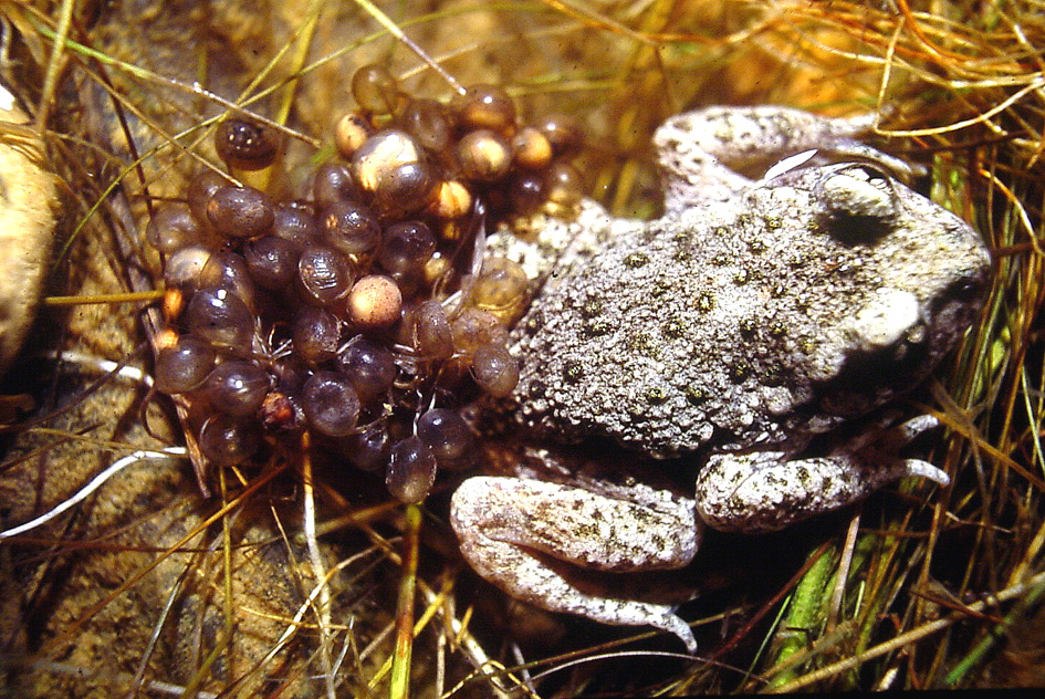 Mâle de Crapaud alyte (Alytes obstetricans) photographié dans les Landes humides paratourbeuses du Plateau d'Helfaut (Département du Pas-de-Calais, France). (Diapositive scannée) Date : Vers 1990 Author : F. Lamiot (Own Work)